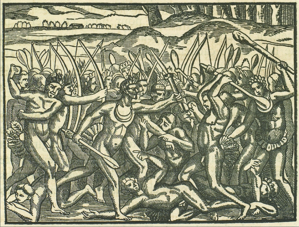 Comme ces sauvages font guerre les uns contre les autres.